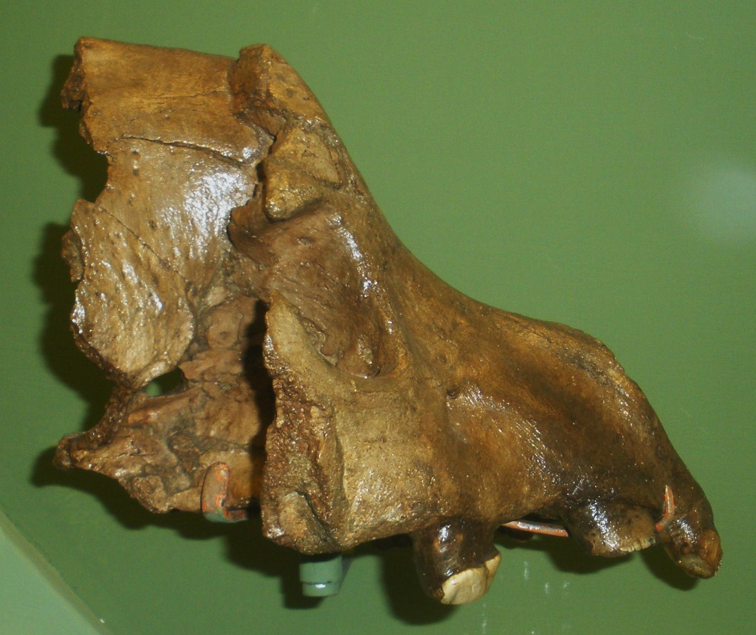 Fossil of Pachycrocuta, an extinct mammal- Took the picture at Museo di Paleontologia di Firenze